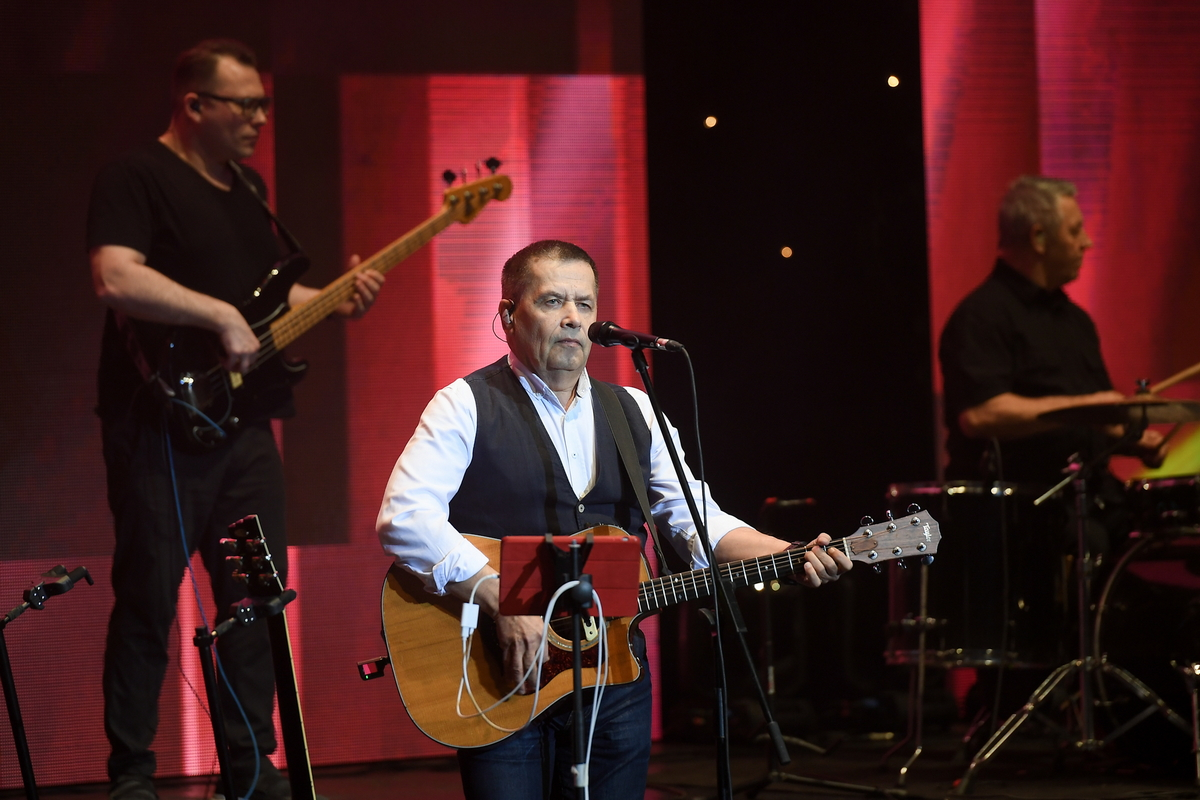 Торжественное мероприятие, посвященное 100-летнему юбилею Центрального музея Вооруженных Сил Российской Федерации в Центральном академическом театре Российской Армии. Выступление группы "Любэ"